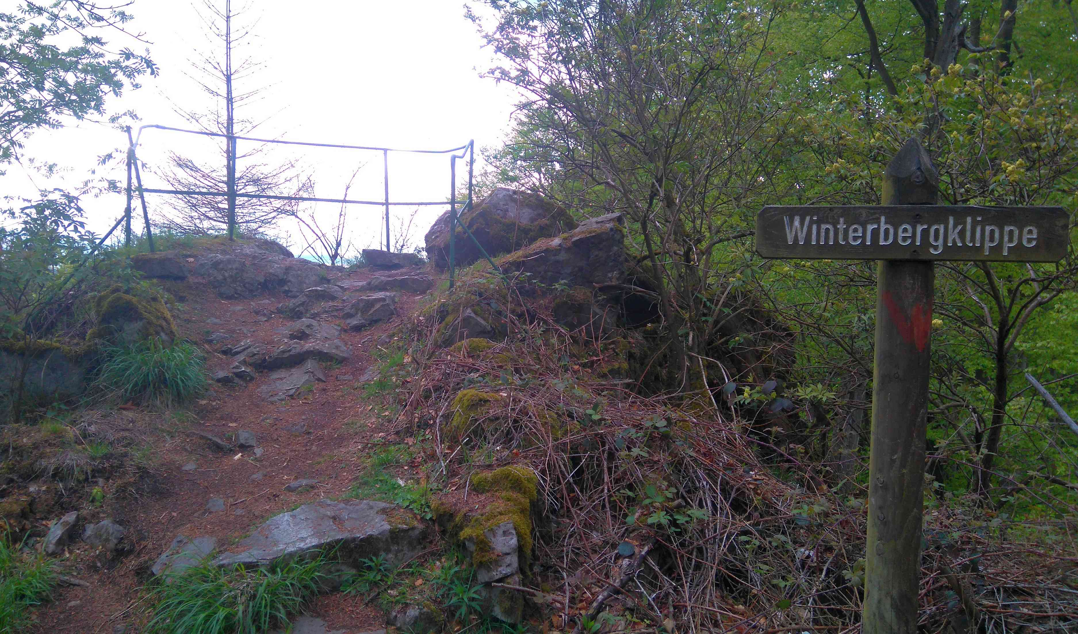 Winterbergklippe